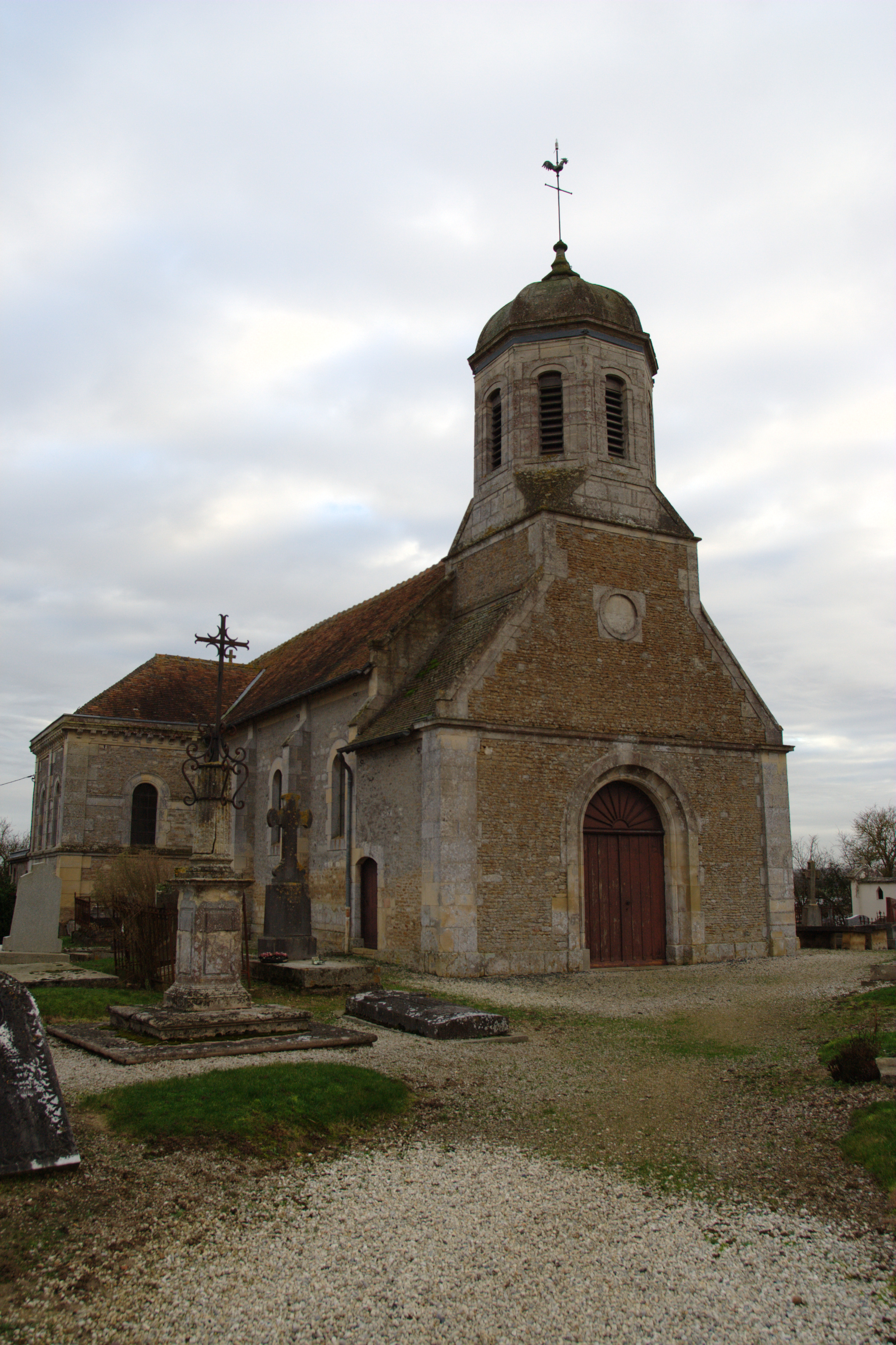 Église de Saint-Samson (Calvados).